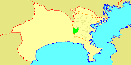 Map of Izumi-ku, Yokohama, Kanagawa-prefecture, Japan